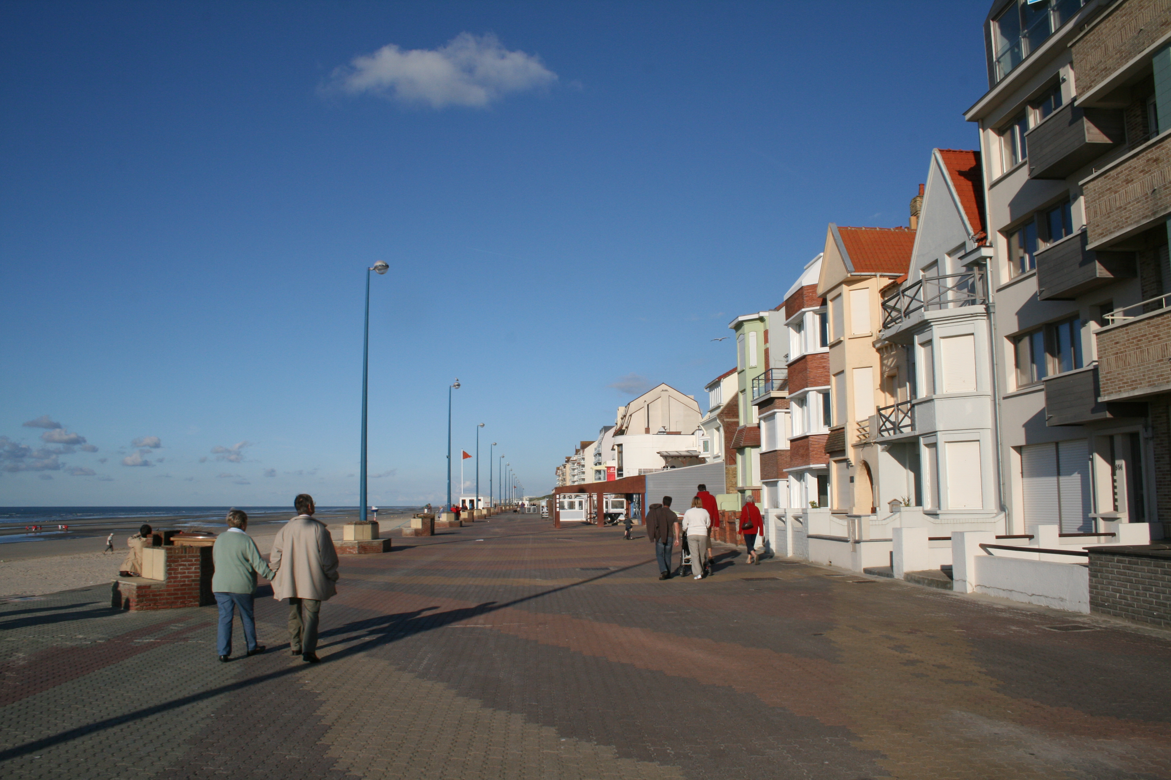 Bray-Dunes (Nord) (France), la promenade sur la digue.